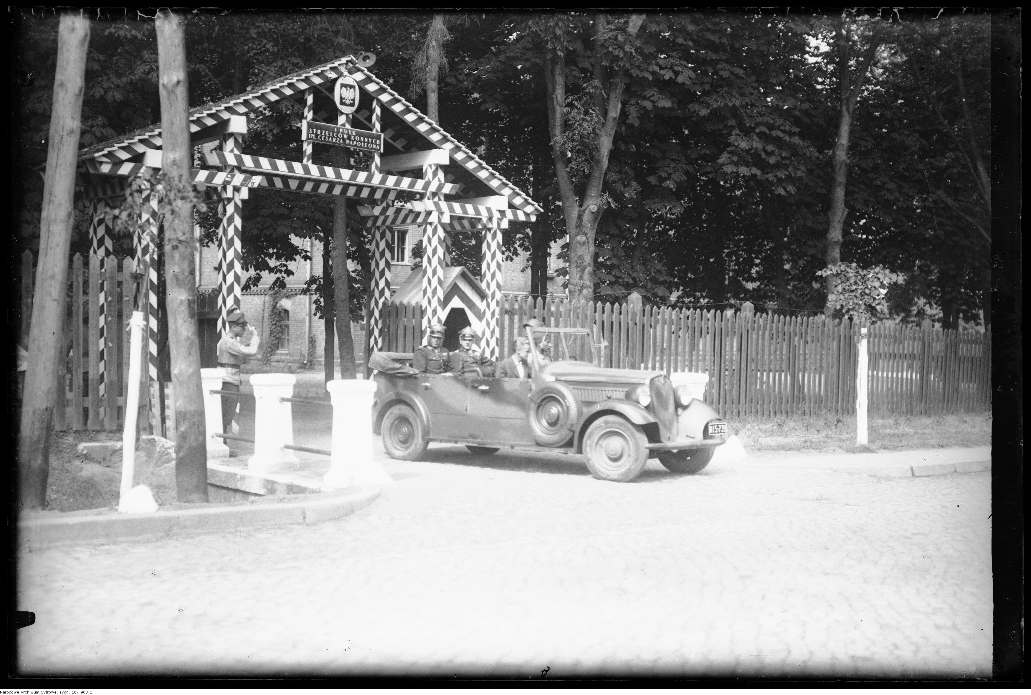 Wyjazd z koszar.